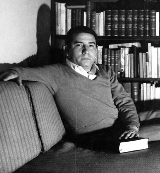 Ítalo López Vallecillos